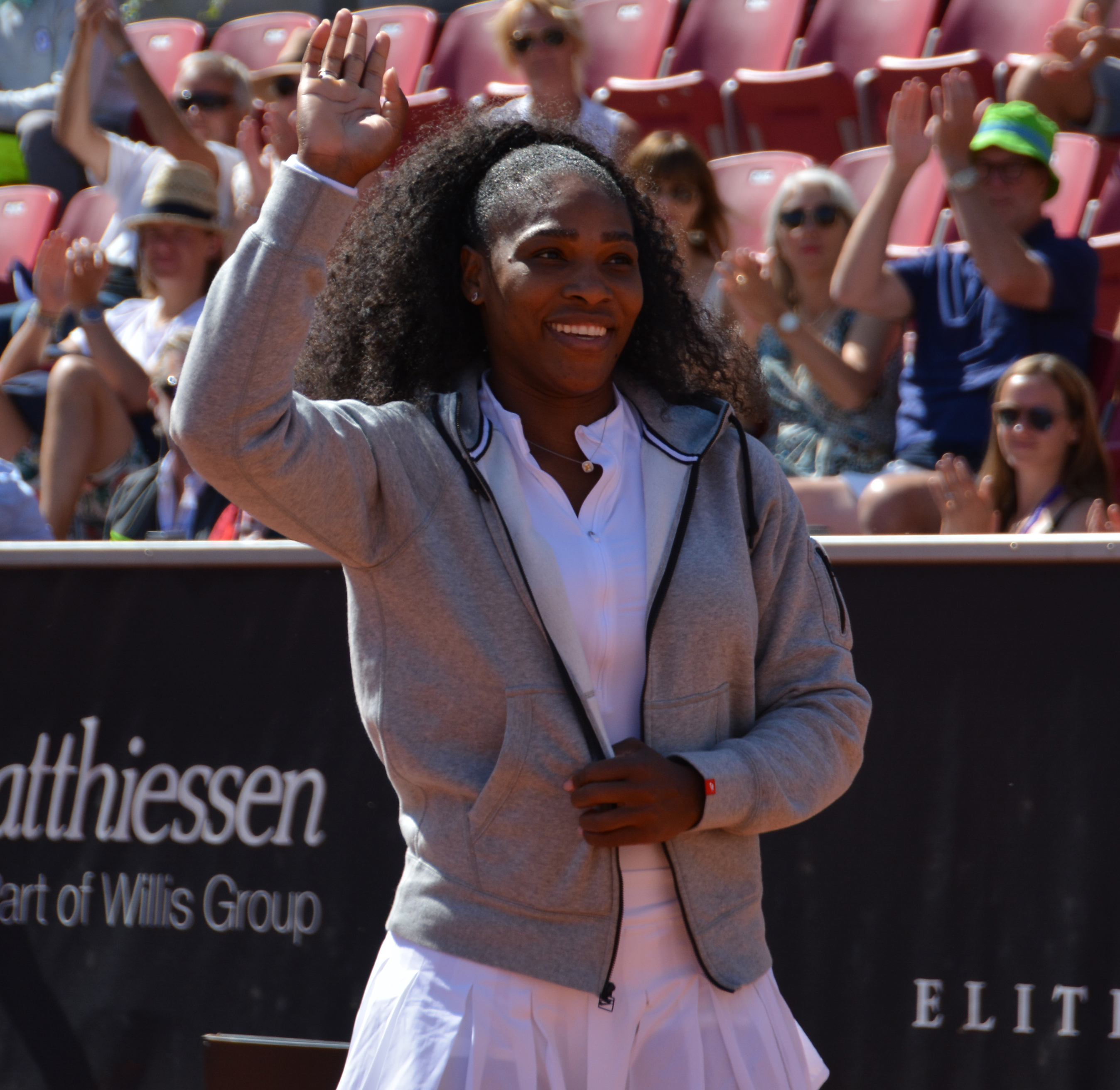 WTA Båstad 2015